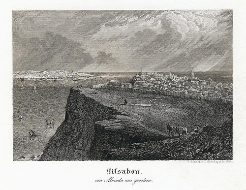 Leopold Zechmayer (1805 - 1860), Almada in una acquaforte del 1834.